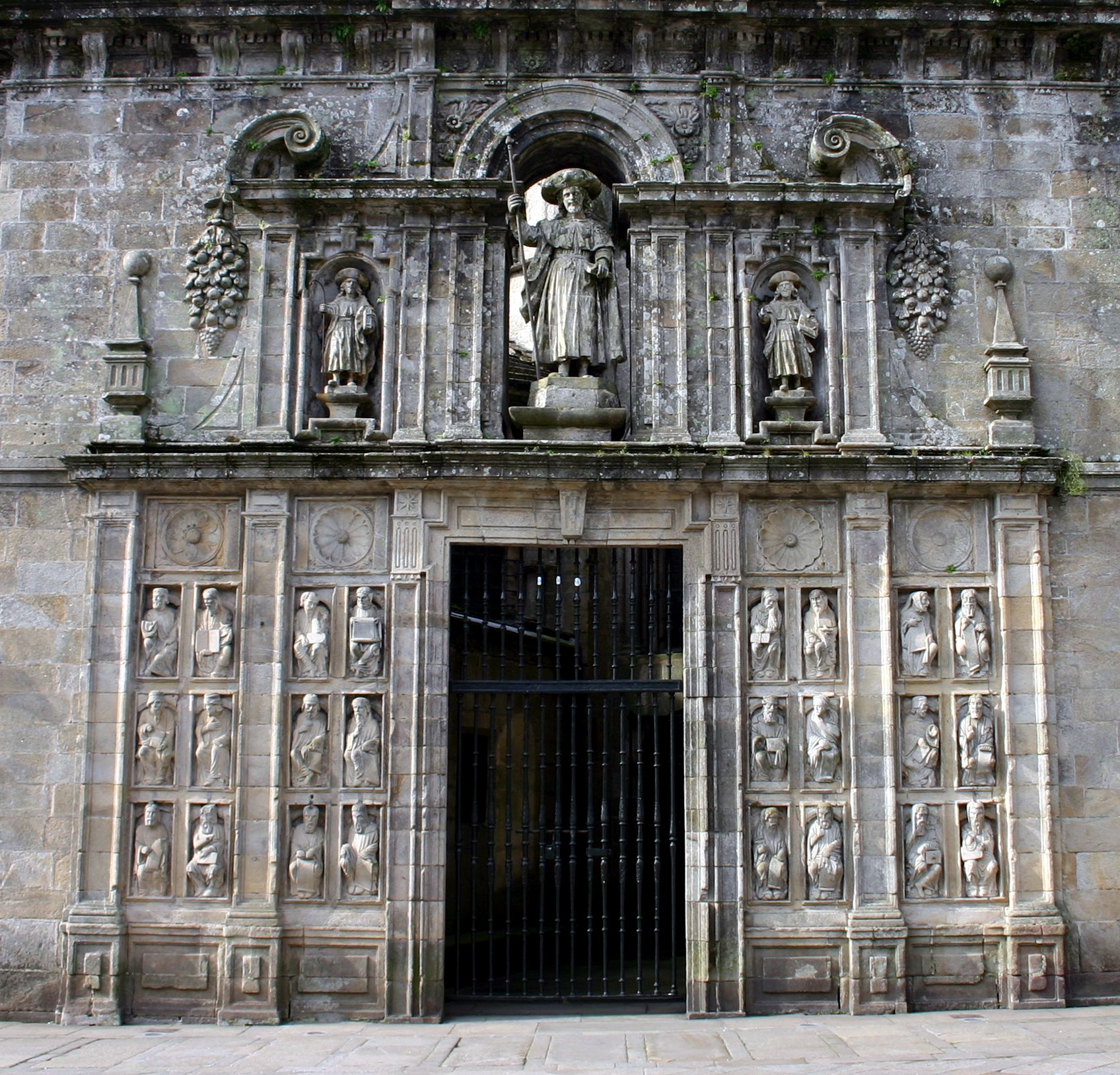 Porta del Perdó de la catedral de Santiago de Compostel·la